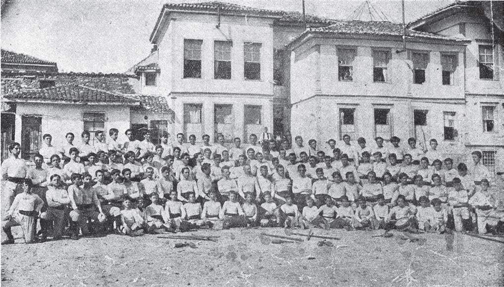 Гимнастически курс в Солун през 1912 г. за македонските учители.